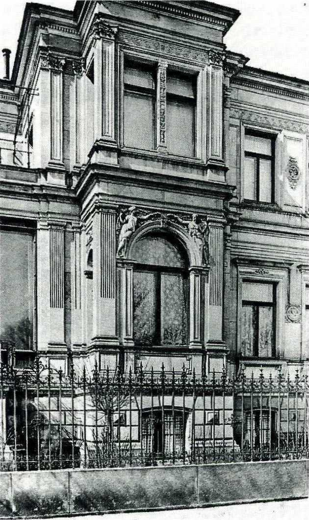 Dresden, Villa Beuststraße 1. Seitenrisalit nach der Parkstraße. Aufnahme um 1875 (zerstört)